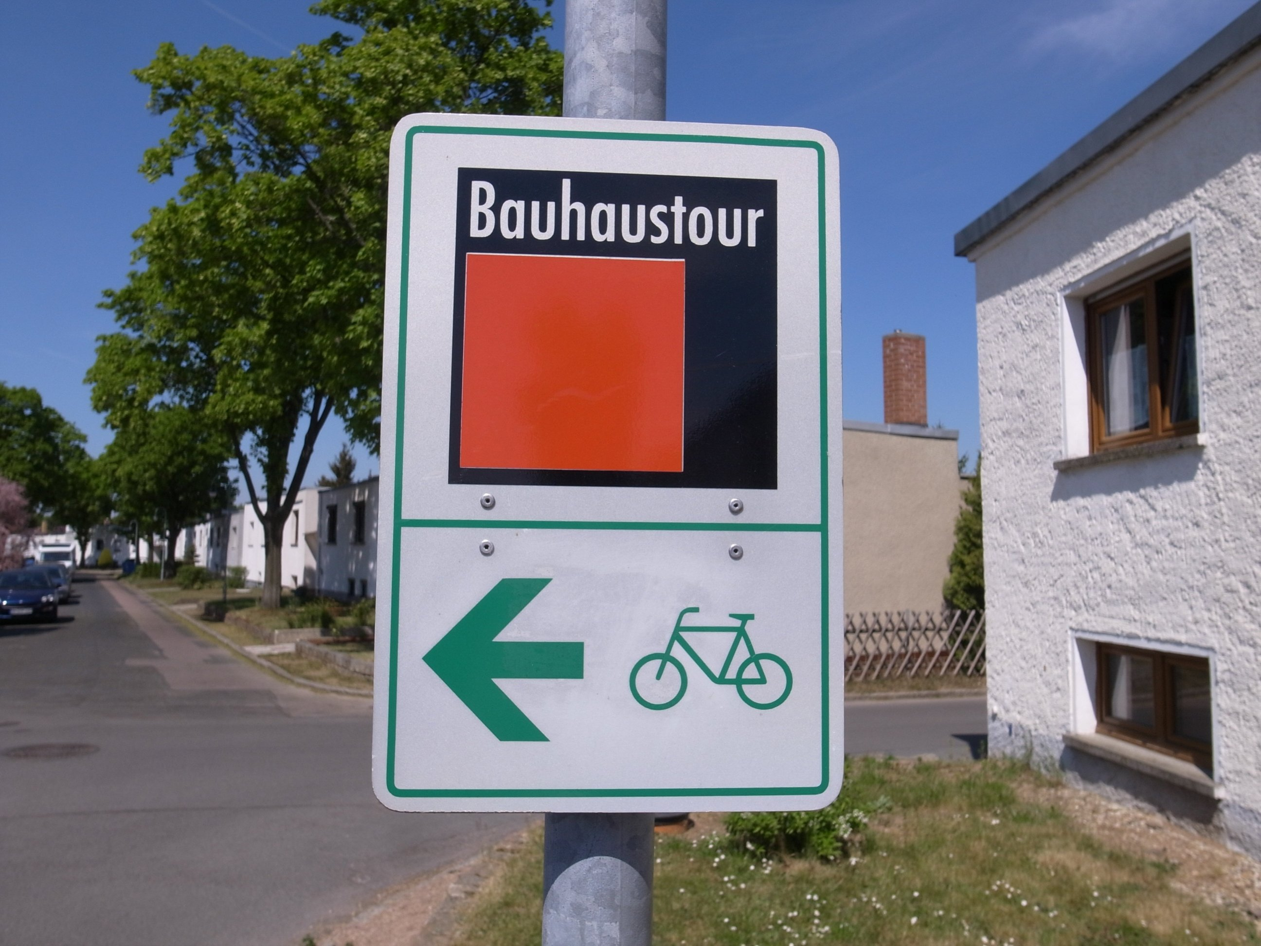 Wegweiser der Bauhaustour in Dessau